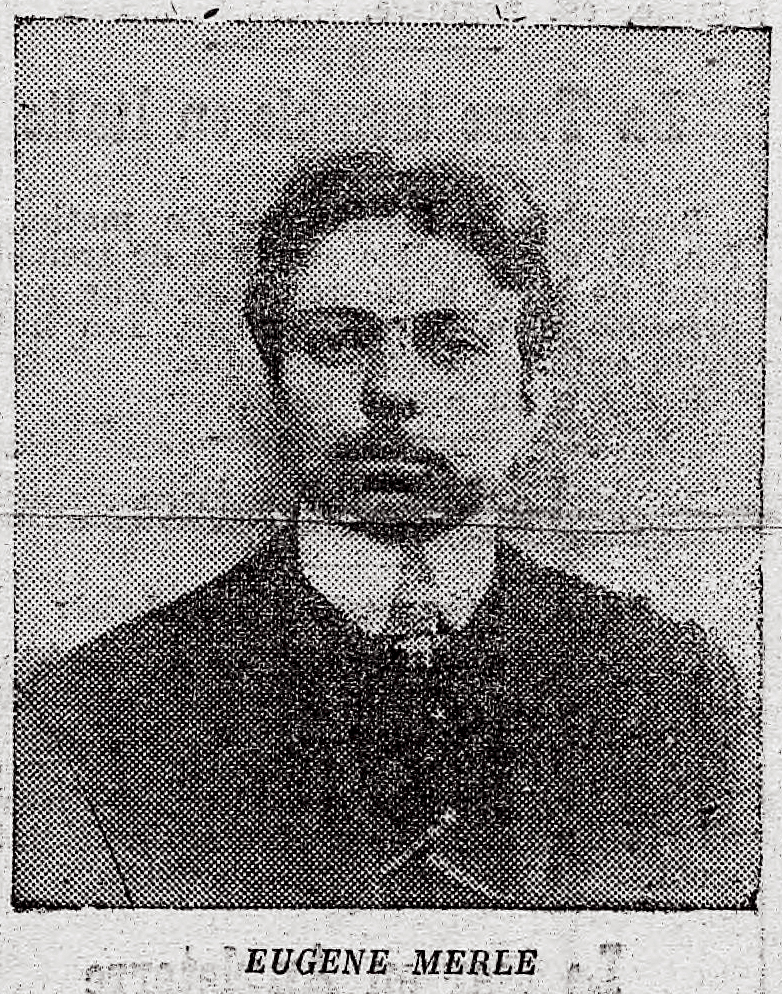 Photo in L'Humanité.